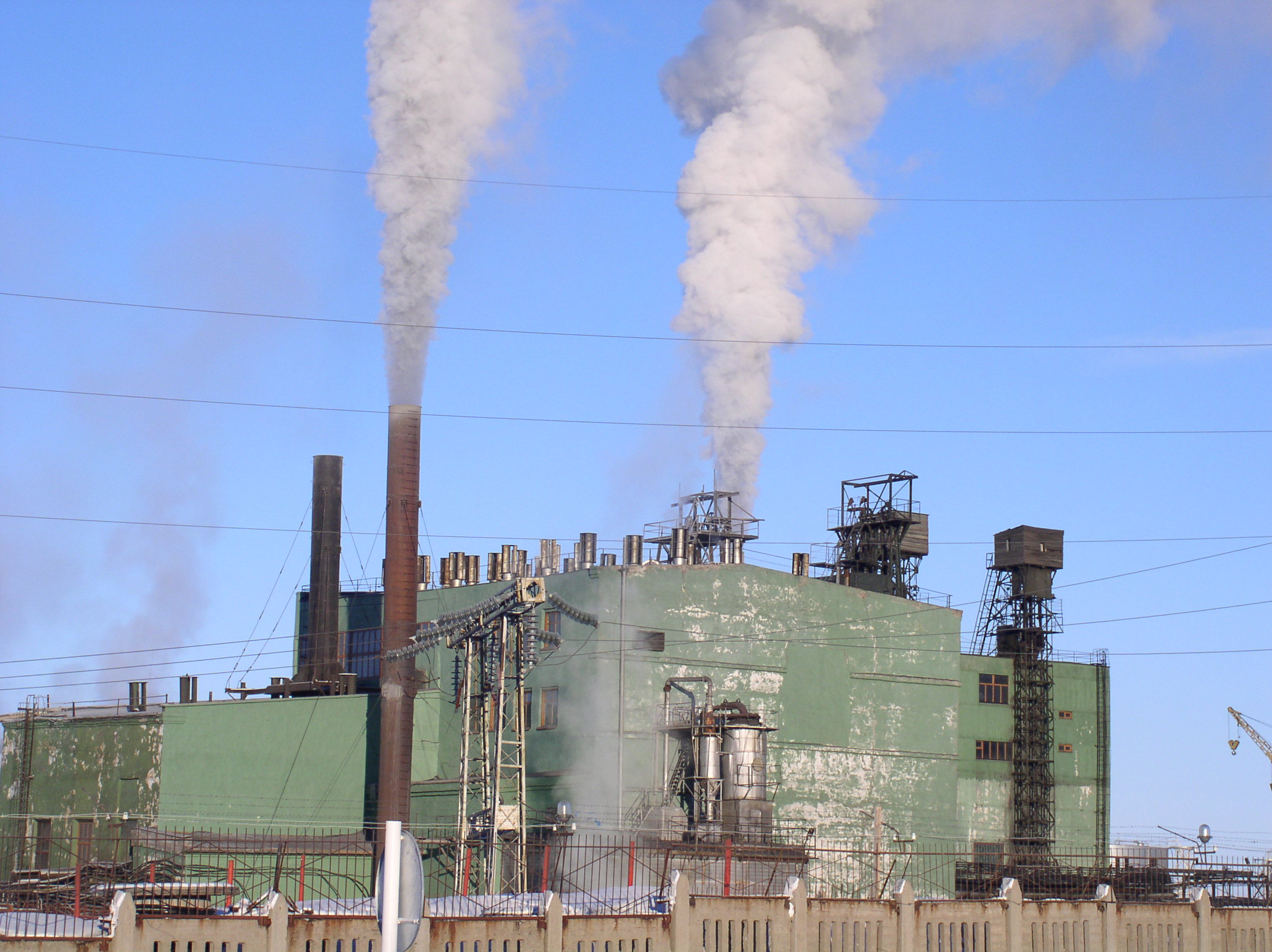 Чаунская ТЭЦ